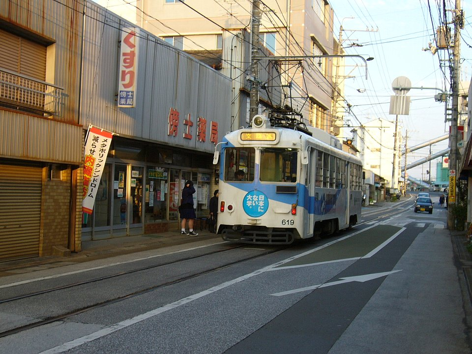 鴨部停留場 東望